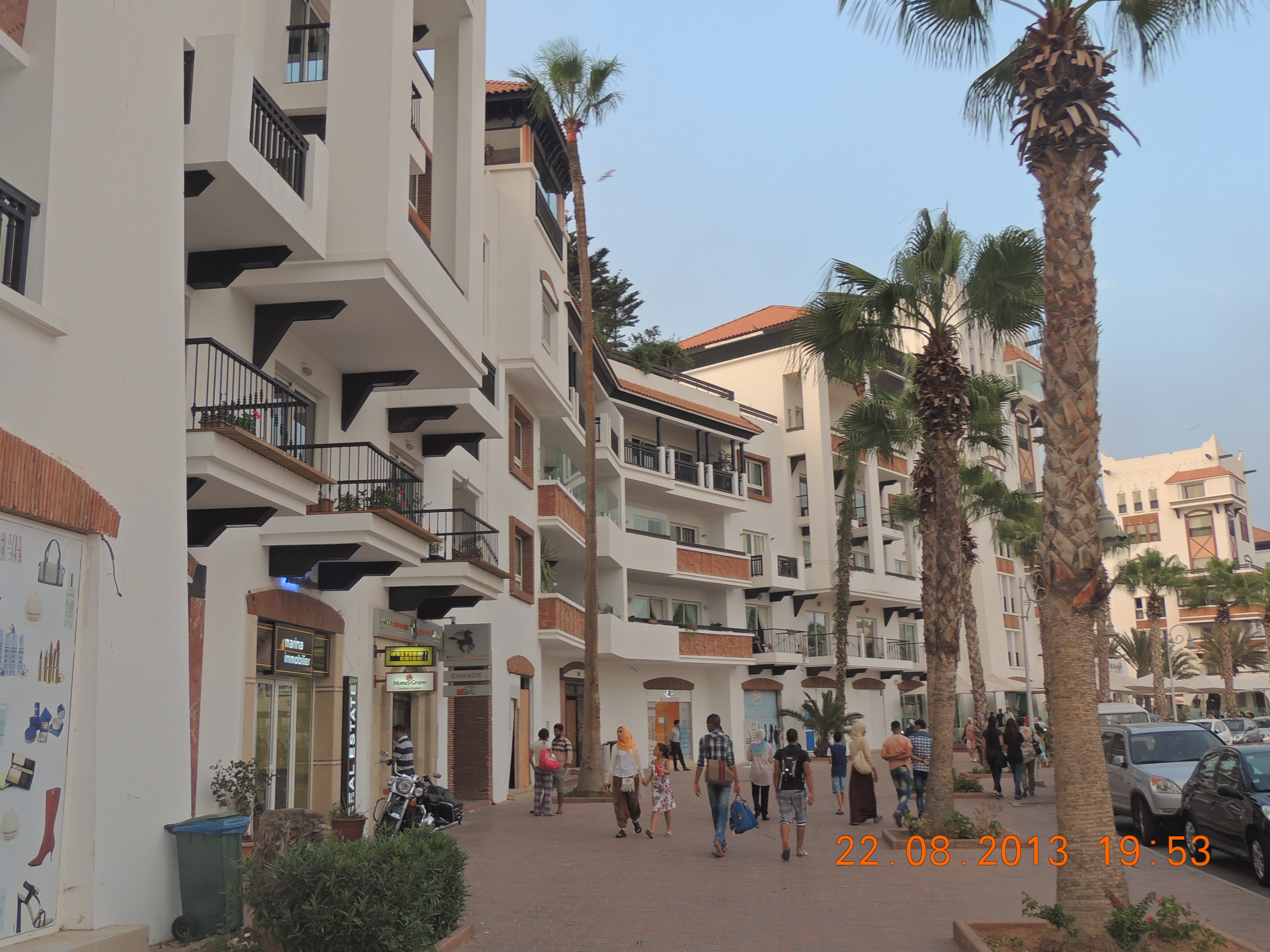 agadir